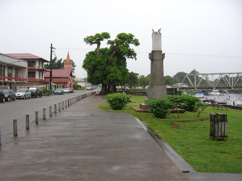 Vue du bourg de Sinnamary (Guyane, France) - 2006 Photo personnelle